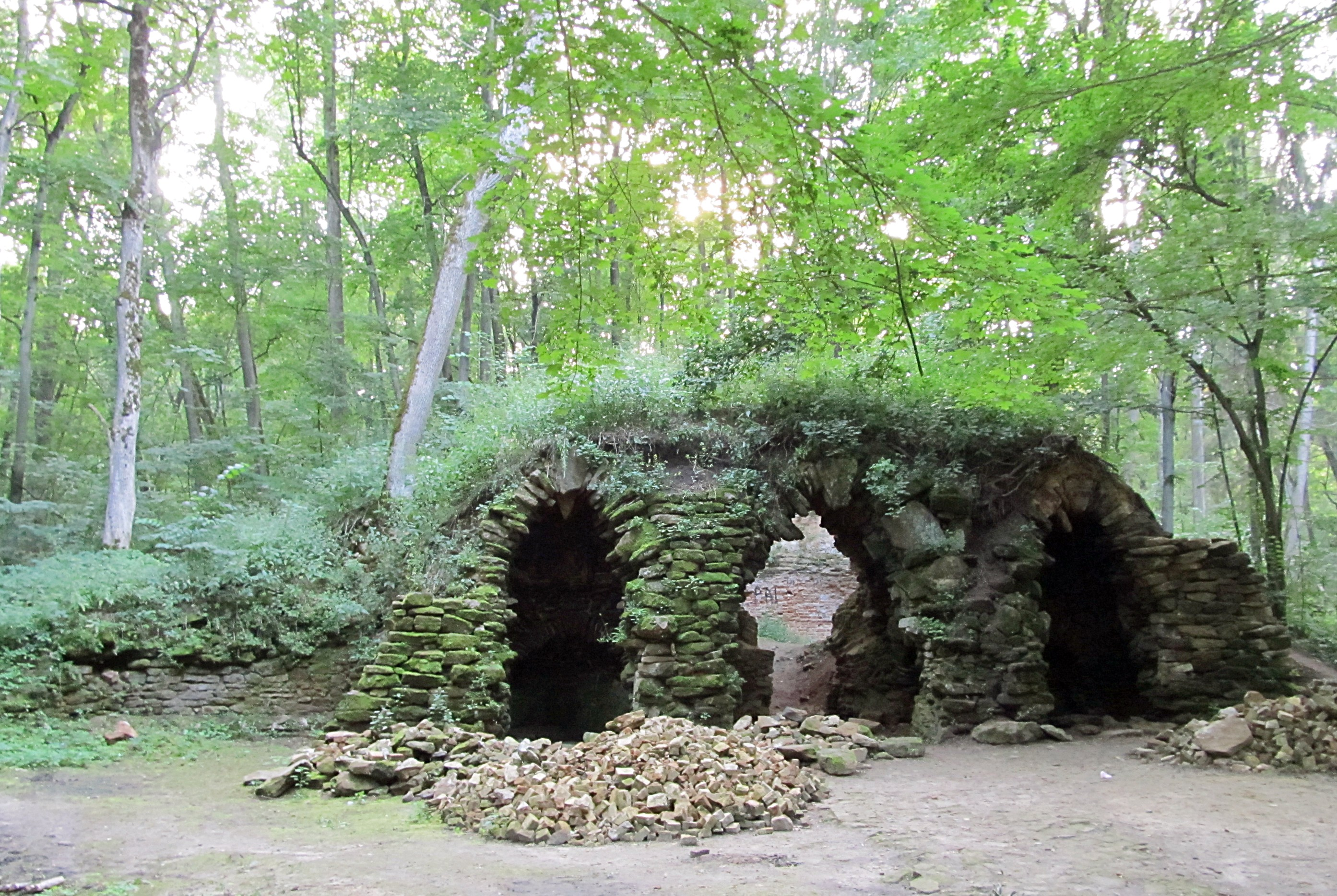 Руїни Гроту німф, урочище Нескучне, м. Тростянець